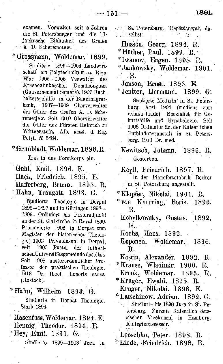 Франгмент из списков поступивших в Петришуле в 1891 году.